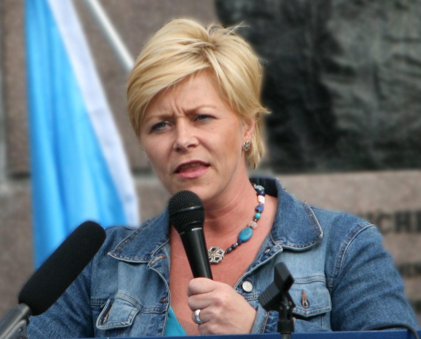 Siv Jensen, Frp-politiker